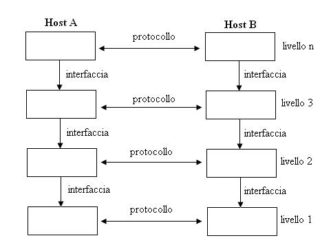 Struttura comunicazione tra livelli